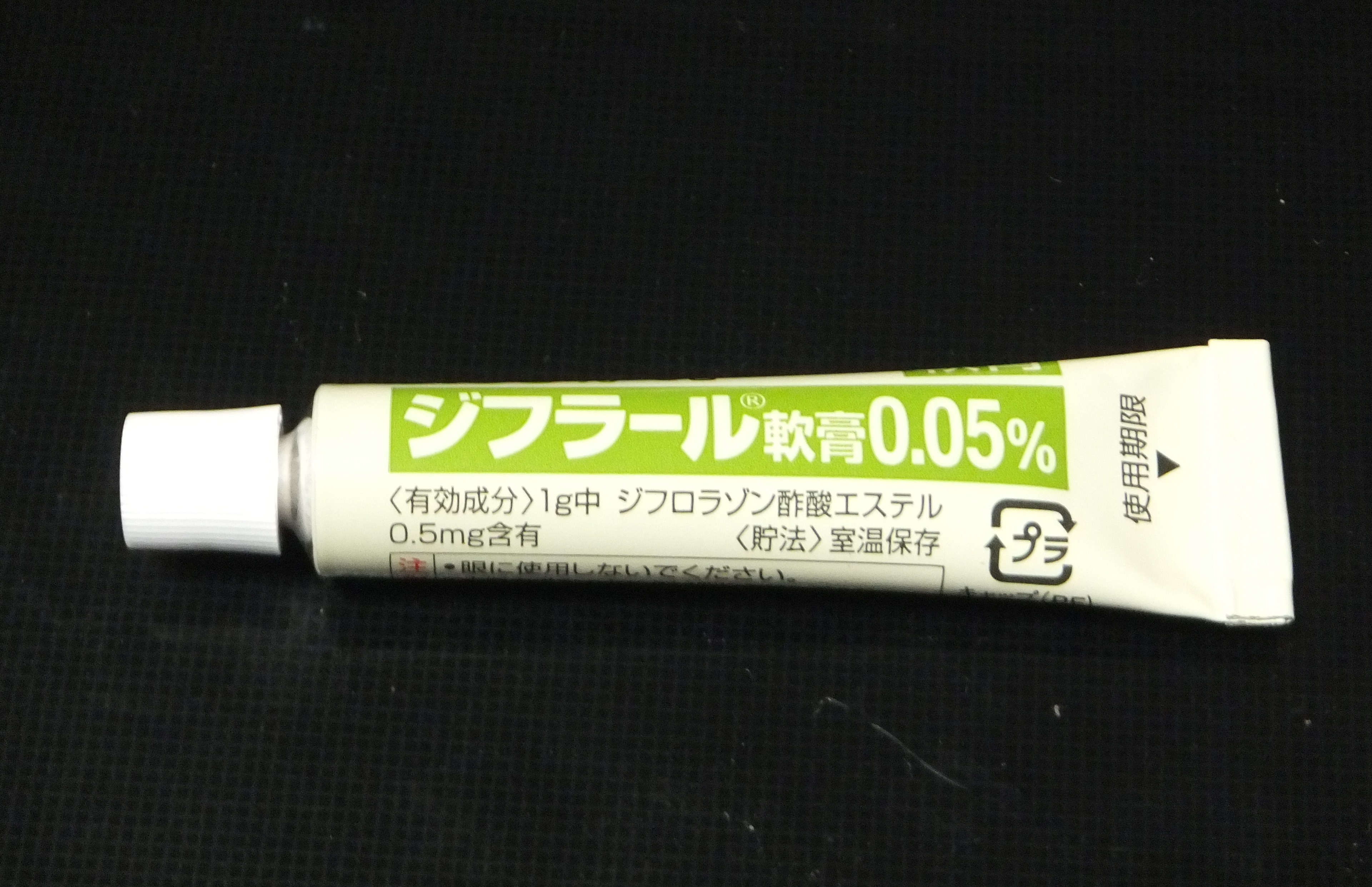 ジフラール軟膏0.05%（5g）